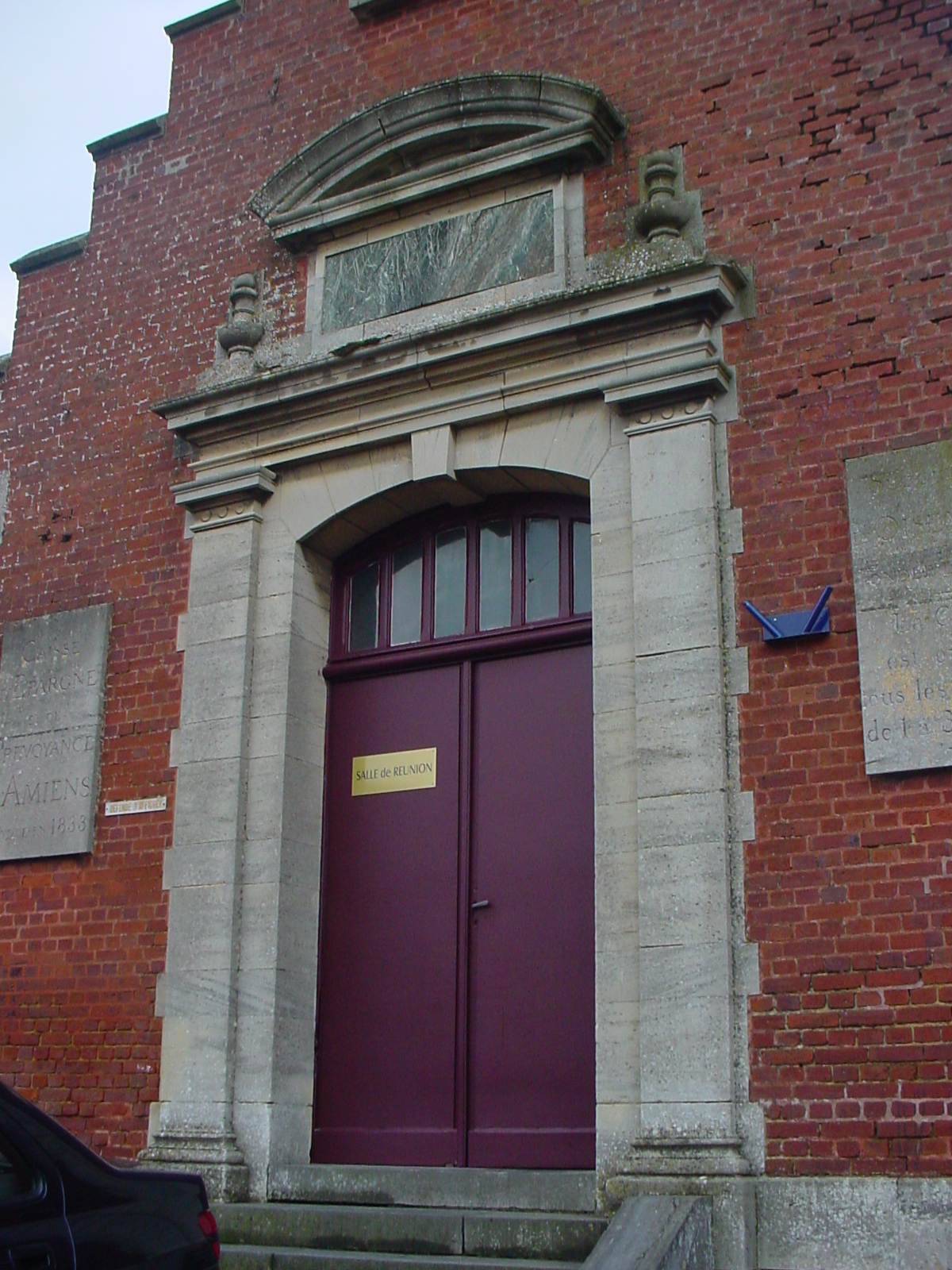 L'ancienne_Caisse_d'Epargne_et_de_retraite_d'Oisemont(Somme(80)-France).